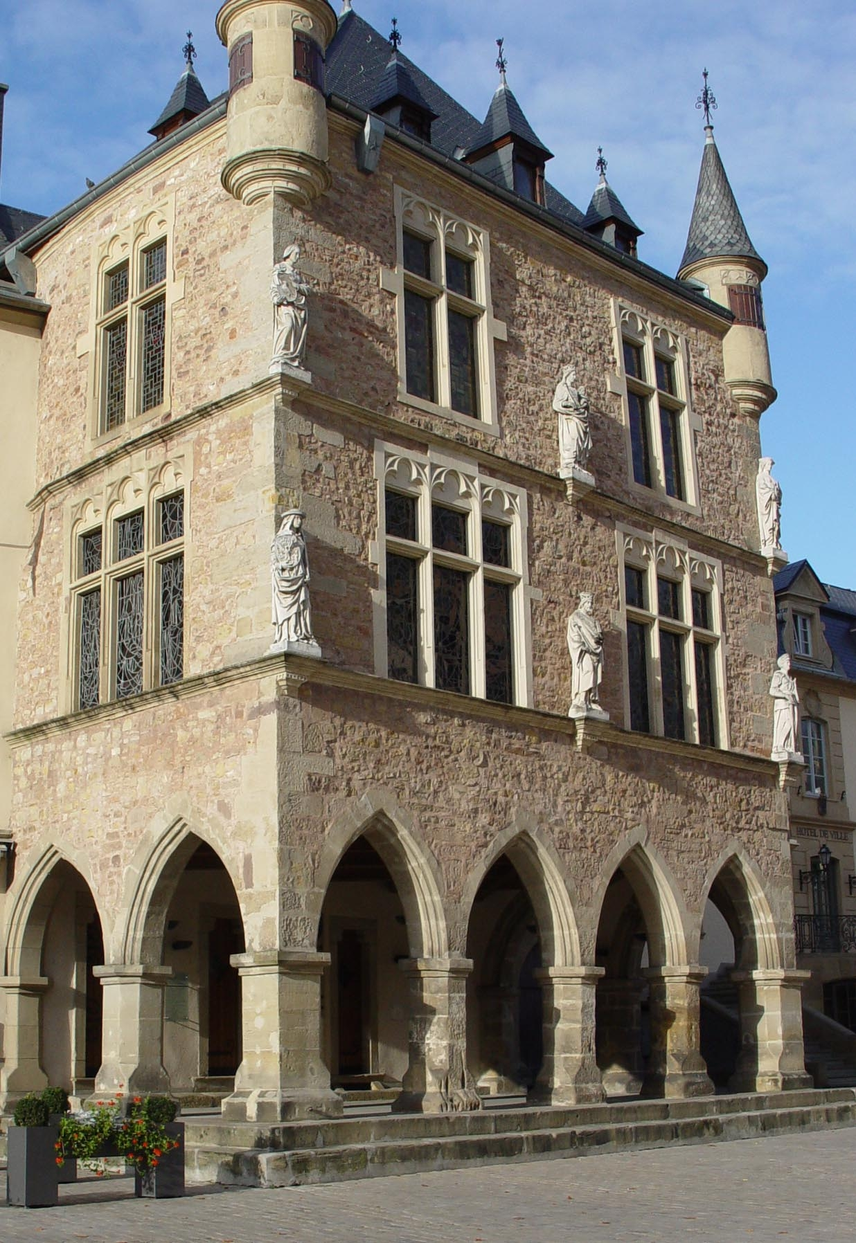 Den Dënzelt zu Iechternach.